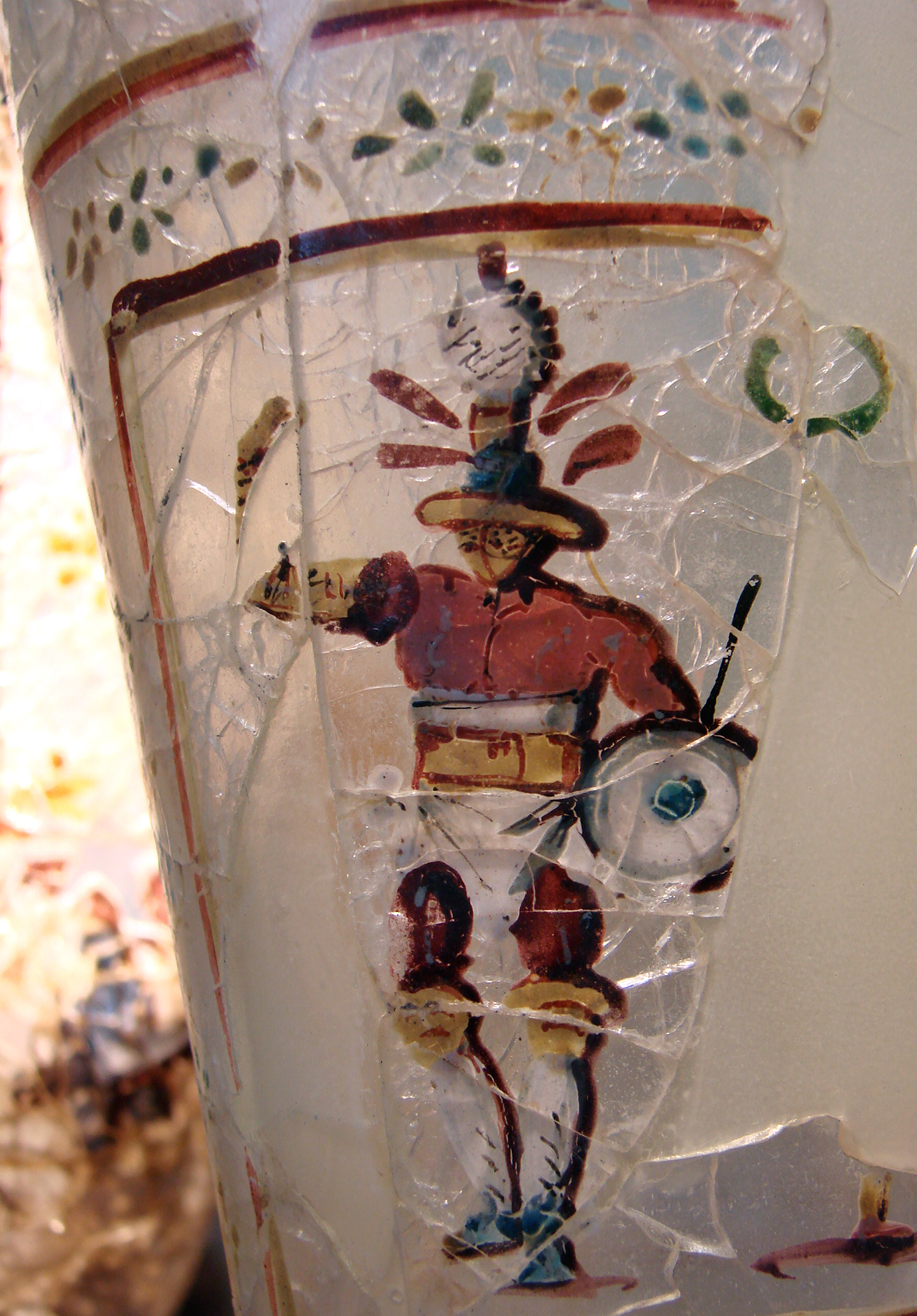 Gladiateur, verre émaillé. Art romain, 1er siècle après JC, trésor de Begram, région de Kapiça, Afghanistan. Musée Guimet, Paris. Bibl : Pierre Cambon, in : Afghanistan. Les trésors retrouvés., RMN 2007, Paris. Pages 289